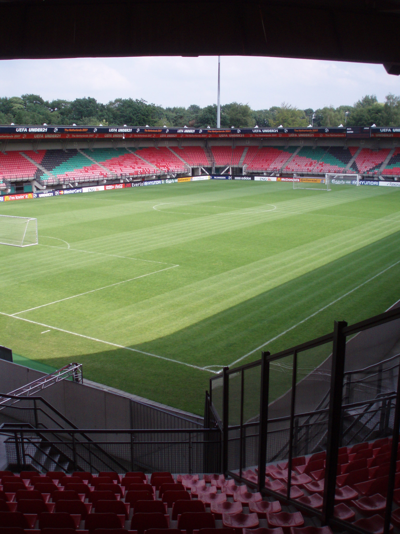 McDos Goffertstadium, Nijmegen